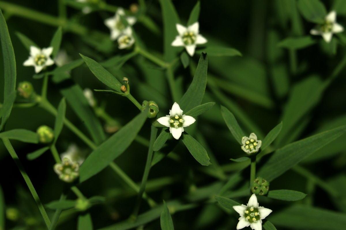 Bavarska lanika na Polhograjski Grmadi.